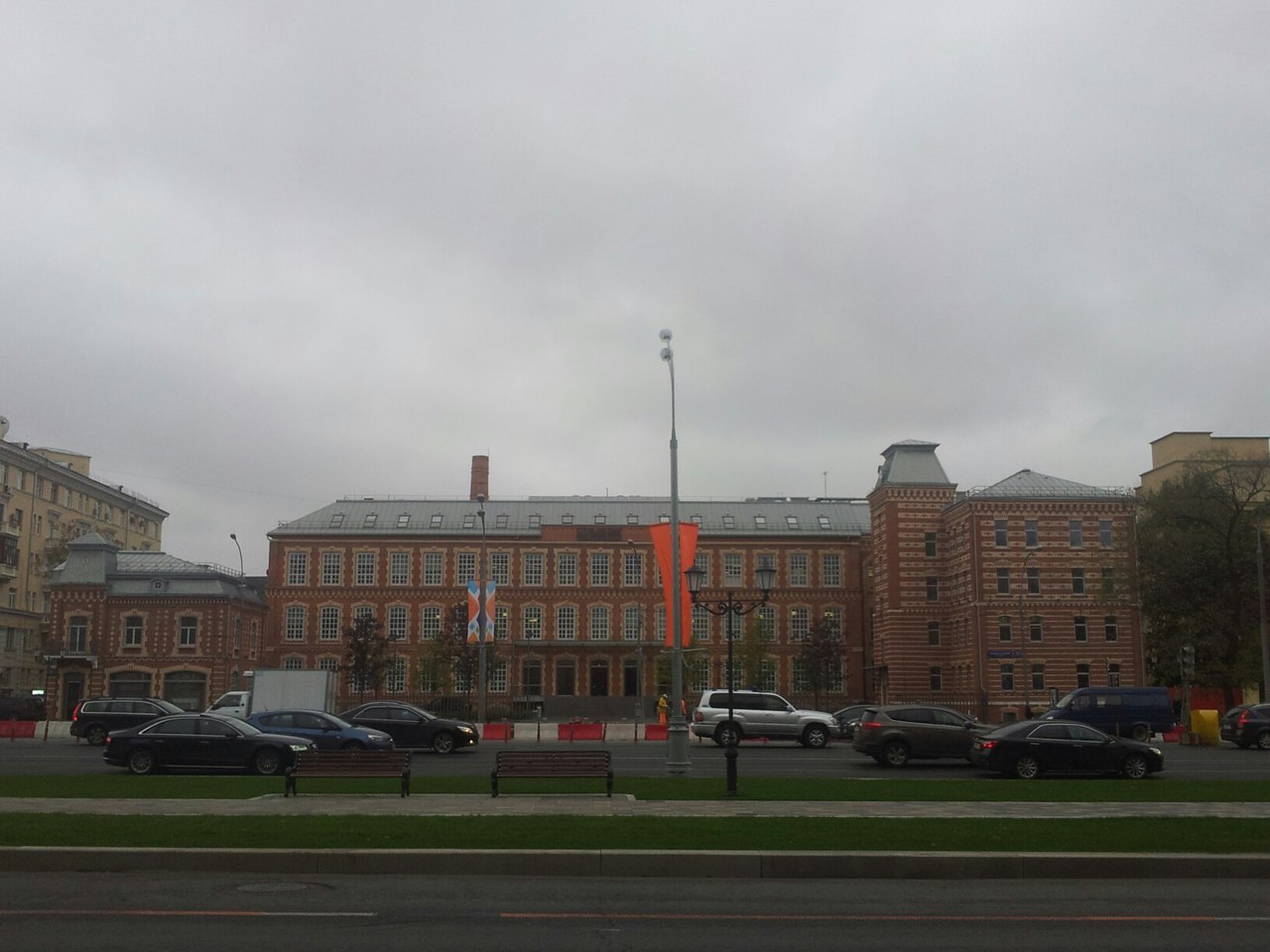 Кондитерская фабрика Товарищества А.Сиу и Ко (после 1924 г. - кондитерская фабрика Большевик): Ленинградский просп., дом 15, строение 1, Беговой, Северный округ, Москва